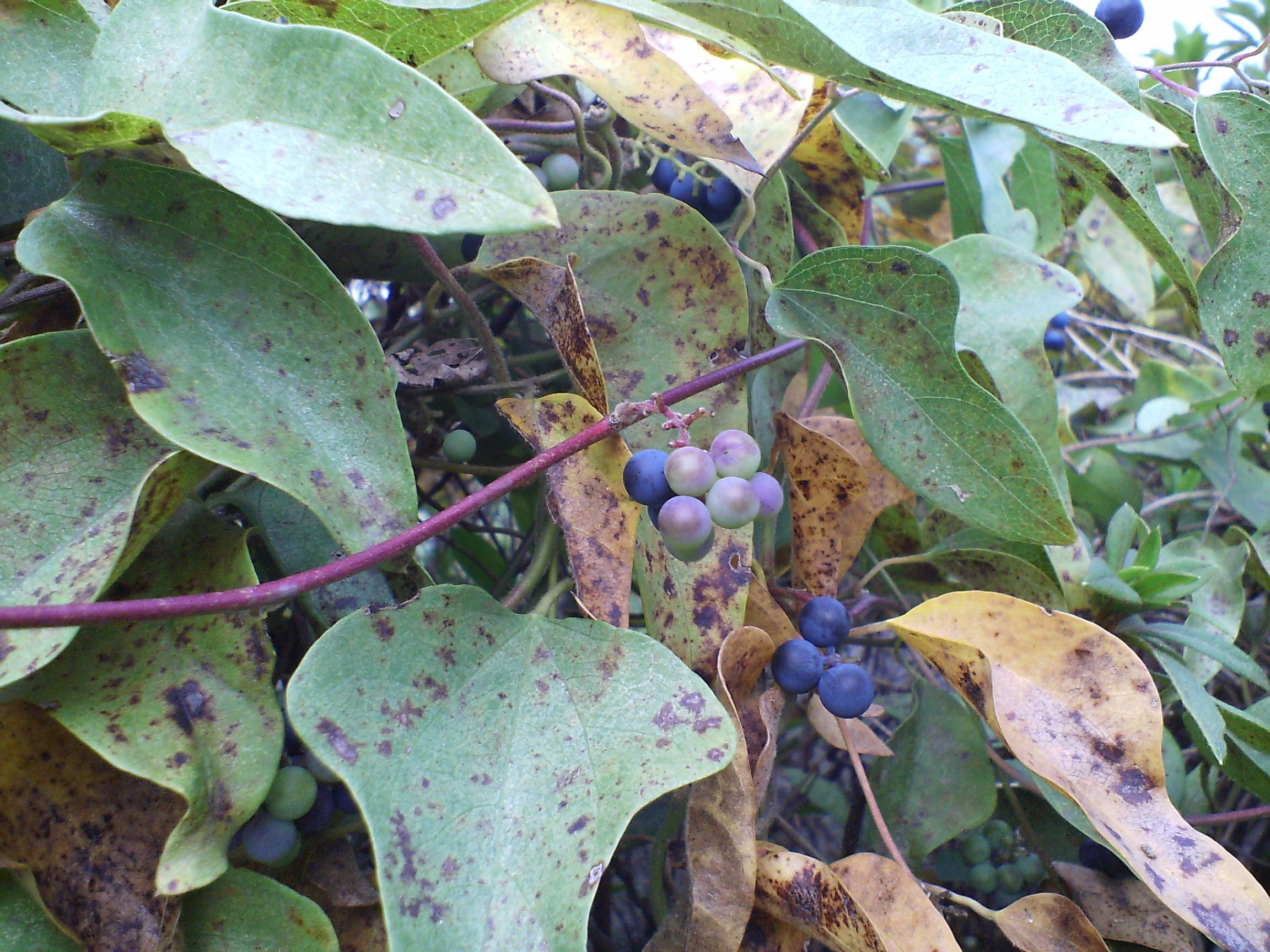 Cocculus orbiculatus(アオツヅラフジ)